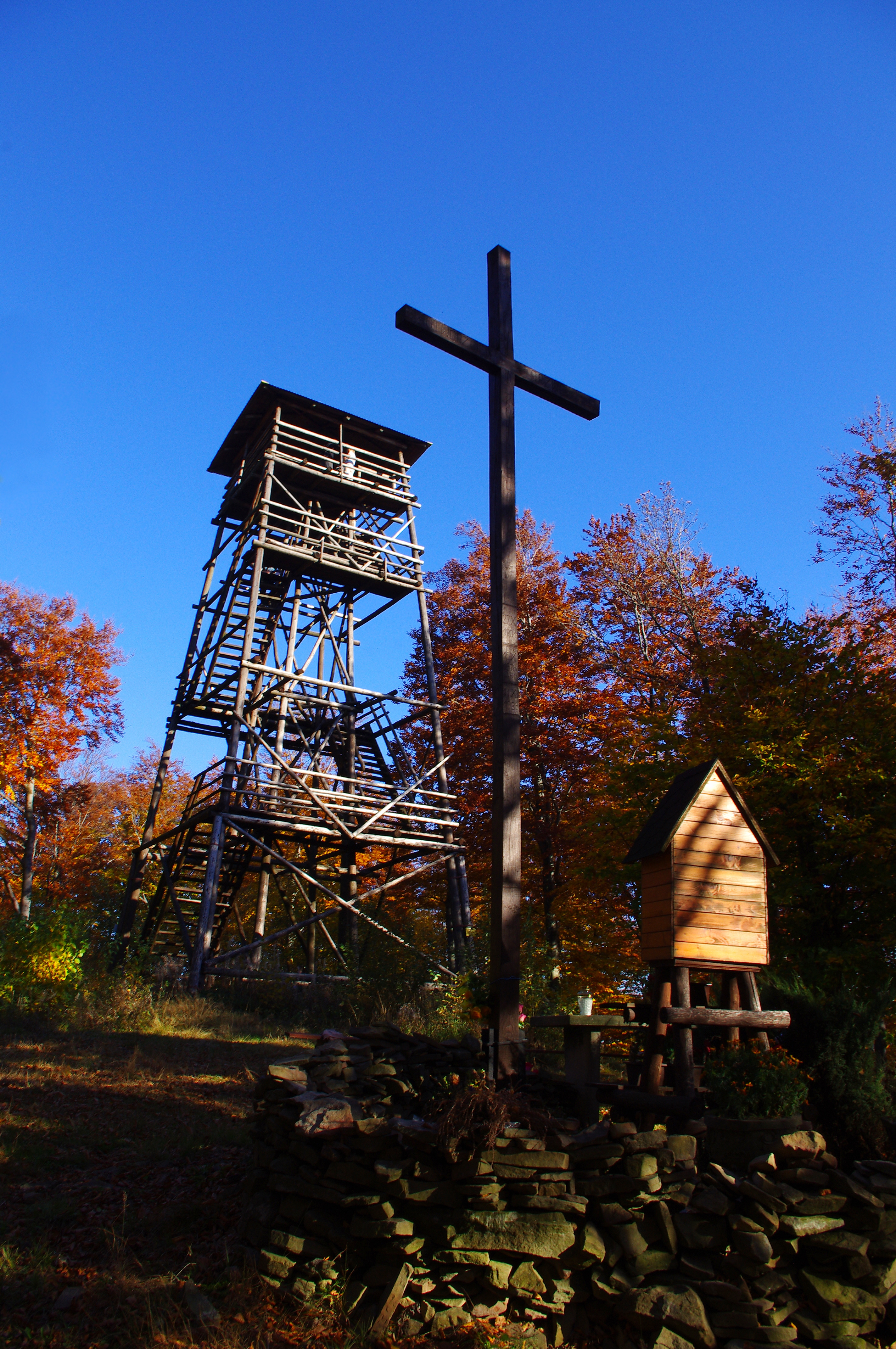 Księża Góra (649 m n.p.m.) jeden ze szczytów w paśmie Ciecienia w Beskidzie Wyspowym.